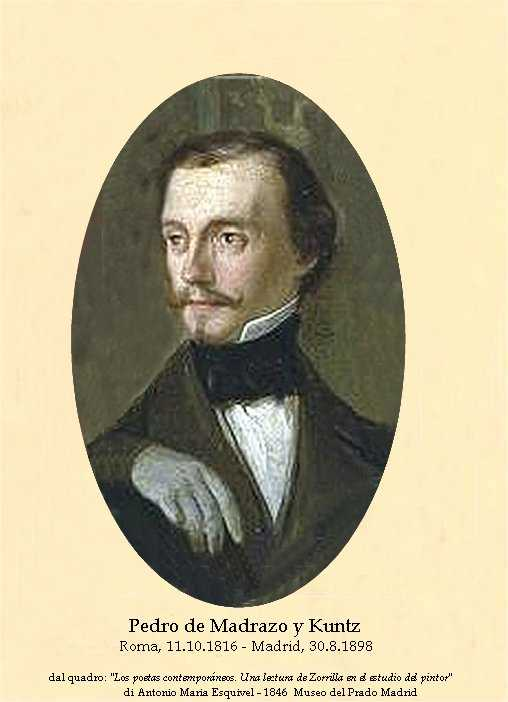 Gemälde zeitgenössischer spanischer Schriftsteller von Antonio Maria Esquivel y Suarez de Urbina (1846) Abgebildete Personen: Antonio Ferrer del Río (1814-1872), Juan Eugenio Hartzenbusch (1806-1880), Juan Nicasio Gallego (1777-1853), Antonio Gil y Zárate (1793-1861), Tomás Rodríguez Rubí (1817-1890), Isidoro Gil y Baus (1814-1866), Cayetano Rosell y López (1817-1883), Antonio Flores (1818-1866), Manuel Bretón de los Herreros (1796-1873), Francisco González Elipe, Patricio de la Escosura (1807-1878), José María Queipo de Llano, conde de Toreno (1786-1843), Antonio Ros de Olano (1808-1887), Joaquín Francisco Pacheco (1808-1865), Mariano Roca de Togores (1812-1889), Juan González de la Pezuela (1809-1906), Ángel de Saavedra, duque de Rivas (1791-1865), Gabino Tejado (1819-1891), Francisco Javier de Burgos (1824-1902), José Amador de los Ríos (1818-1878), Francisco Martínez de la Rosa (1787-1862), Carlos Doncel, José Zorrilla (1817-1893), José Güell y Renté (1818-1884), José Fernández de la Vega, Ventura de la Vega (1807-1865), Luis de Olona (1823-1863), Antonio María Esquivel, Julián Romea (1818-1863), Manuel José Quintana (1772-1857), José de Espronceda (1808-1842), José María Díaz († 1888), Ramón de Campoamor (1817-1901), Manuel Cañete (1822-1891), Pedro de Madrazo y Kuntz (1816-1898), Aureliano Fernández Guerra (1816-1891), Ramón de Mesonero Romanos (1803-1882), Cándido Nocedal (1821-1885), Gregorio Romero Larrañaga (1814-1872), Bernardino Fernández de Velasco y Pimentel, duque de Frías (1873-1851), Eusebio Asquerino (h.1822-1892), Manuel Juan Diana (1814-1881), Agustín Durán (1793-1862).